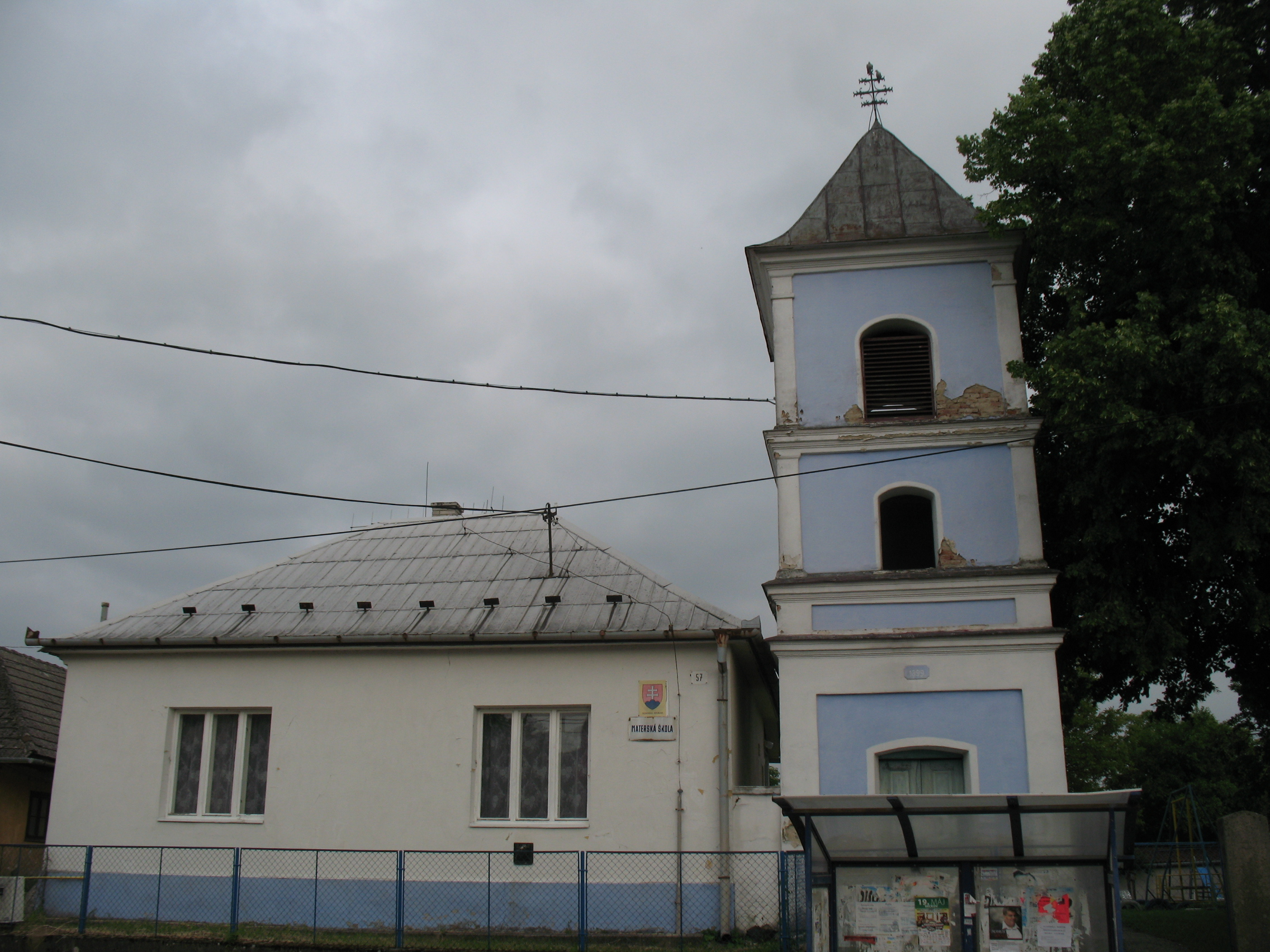 Vágcsütörtök